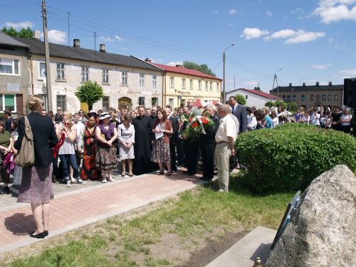 טקס הנחת מצבה בלוטוטוב-יוני2010